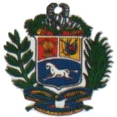 Decreto N° 1353 del 29 de julio de 1863. Artículo 3°: Las armas Federación Venezolana serán el mismo escudo que ha usado hasta hoy la República, dividido en tres cuarteles. El cuartel de la derecha será rojo y en él se colocará un manojo de mieses que tendrá tantas espigas cuanto sean los estados de la Federación. El de la izquierda será amarillo, y como emblema del triunfo llevará armas y pabellones enlazados con una corona de laurel. El tercer cuartel que ocupará toda la parte inferior será azul, y contendrá un caballo indómito blanco, como símbolo de la independencia y de la libertad. El escudo tendrá por timbre el emblema de la abundancia, y en la parte inferior un rama de oliva y una palma atadas con tiras azules y amarillas, en que se leerán las inscripciones siguientes: en el centro, Dios y Federación: a la izquierda 5 de julio de 1811.- Independencia: a la derecha, la fecha en que se promulgue la Constitución de los Estados Unidos de Venezuela.- Libertad.